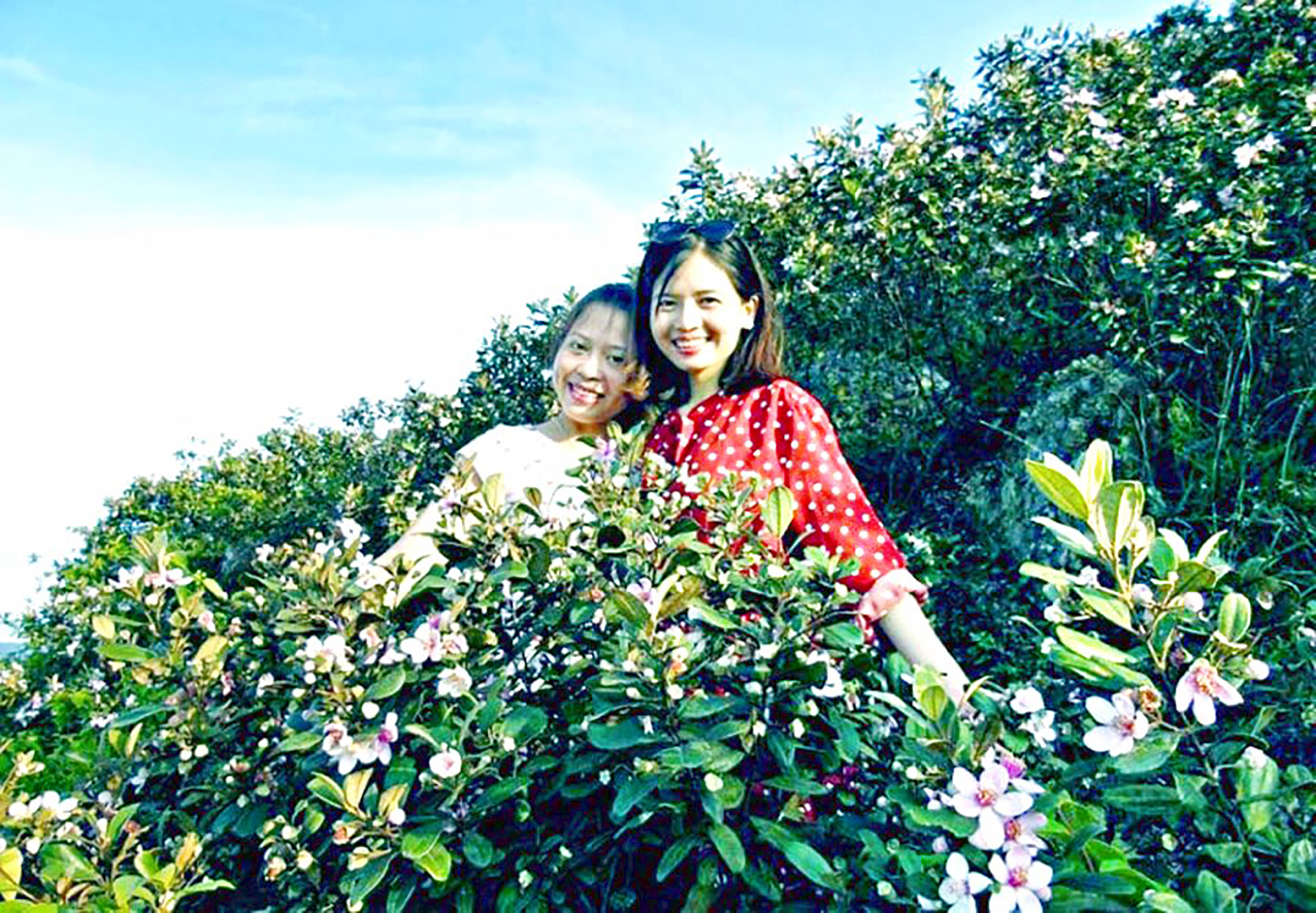 Ảnh đồi sim sưu tầm